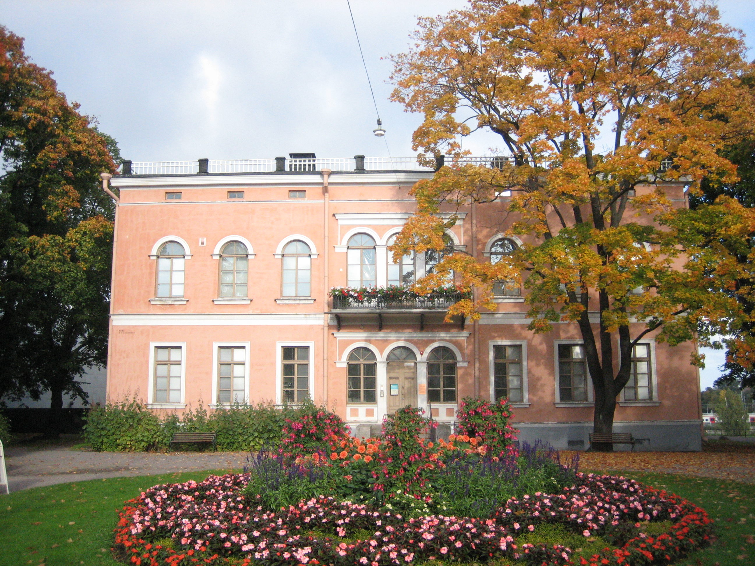 Vila v Hakasalmi, Finsko